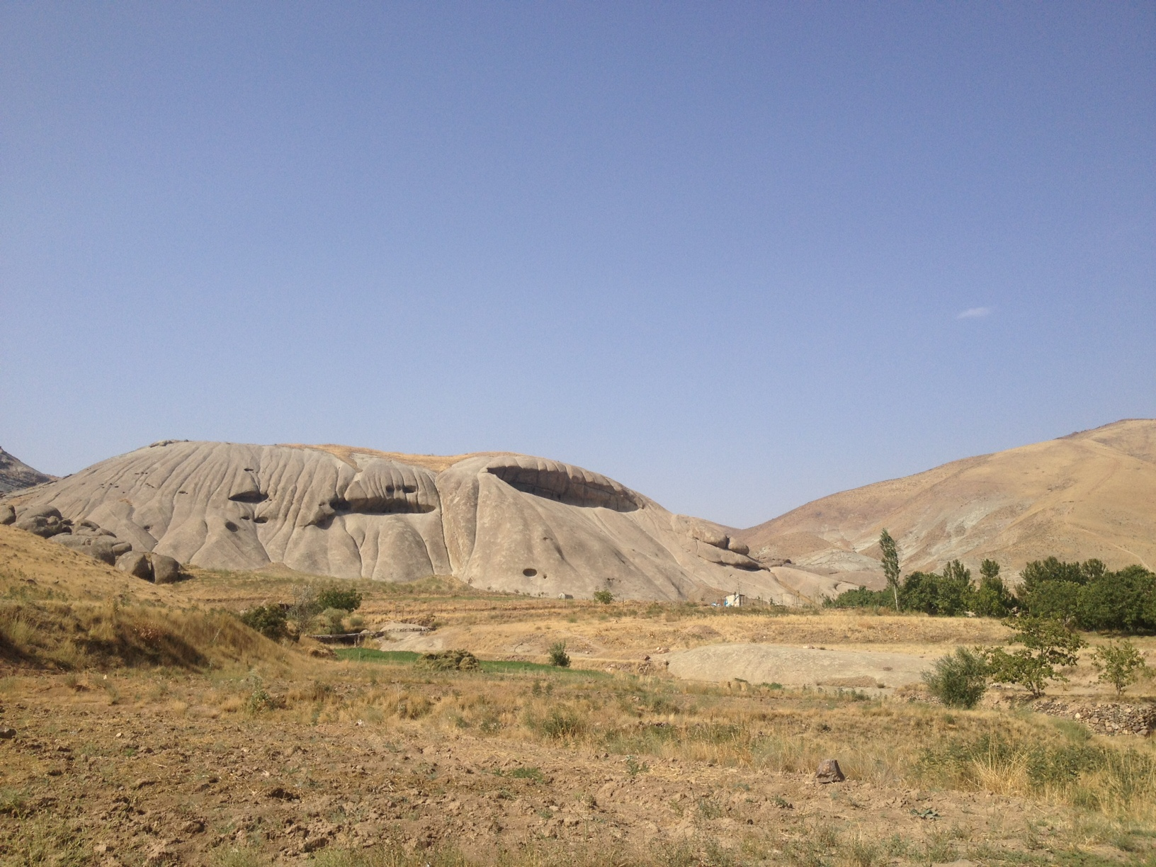 تپه ایوان نیاق